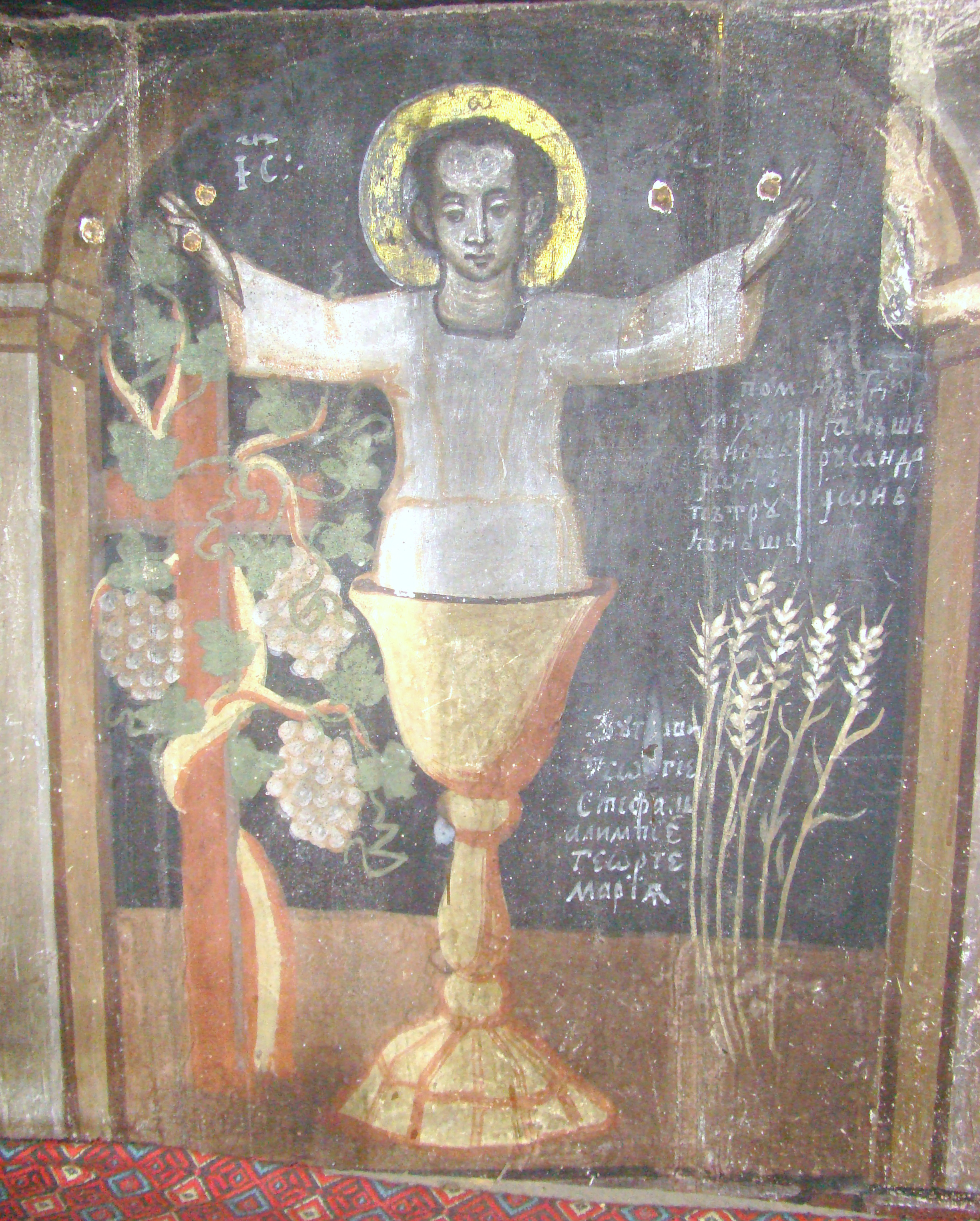 Biserica de lemn „Cuvioasa Paraschiva” din Bătești-Timiș